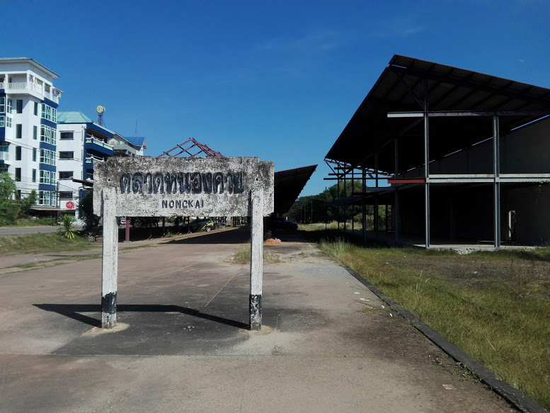 ป้ายสถานีทางทิศตะวันตก